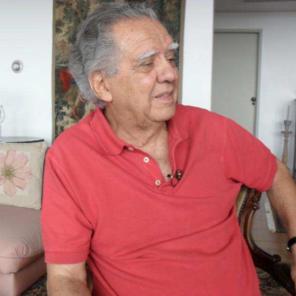 Cineasta brasileiro Luiz Carlos Barreto em imagem do acervo da TV Brasil.